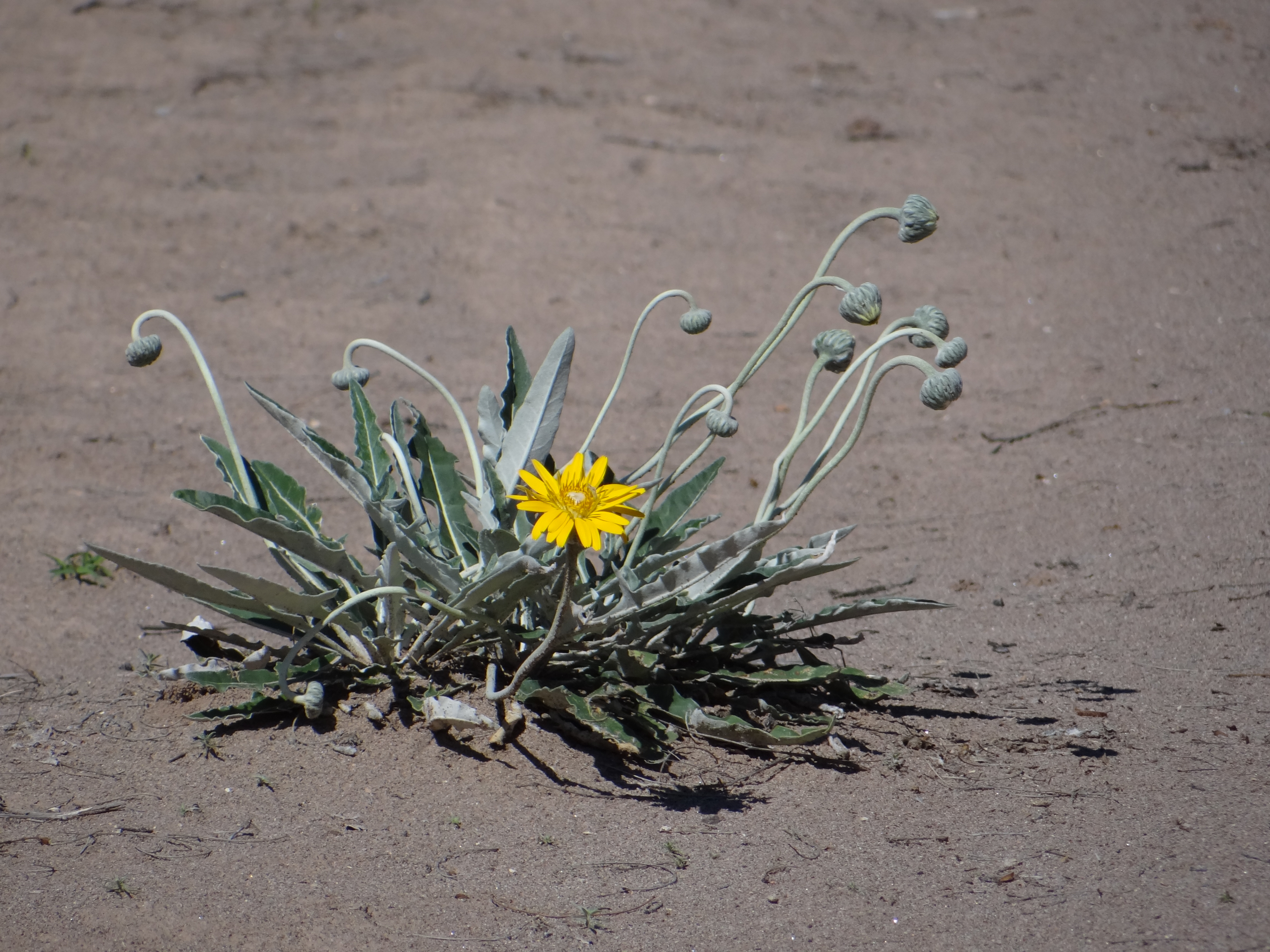 Especie de planta de la familia Asteraceae, foto tomada en la Reserva de Biosfera de Ñacuñán